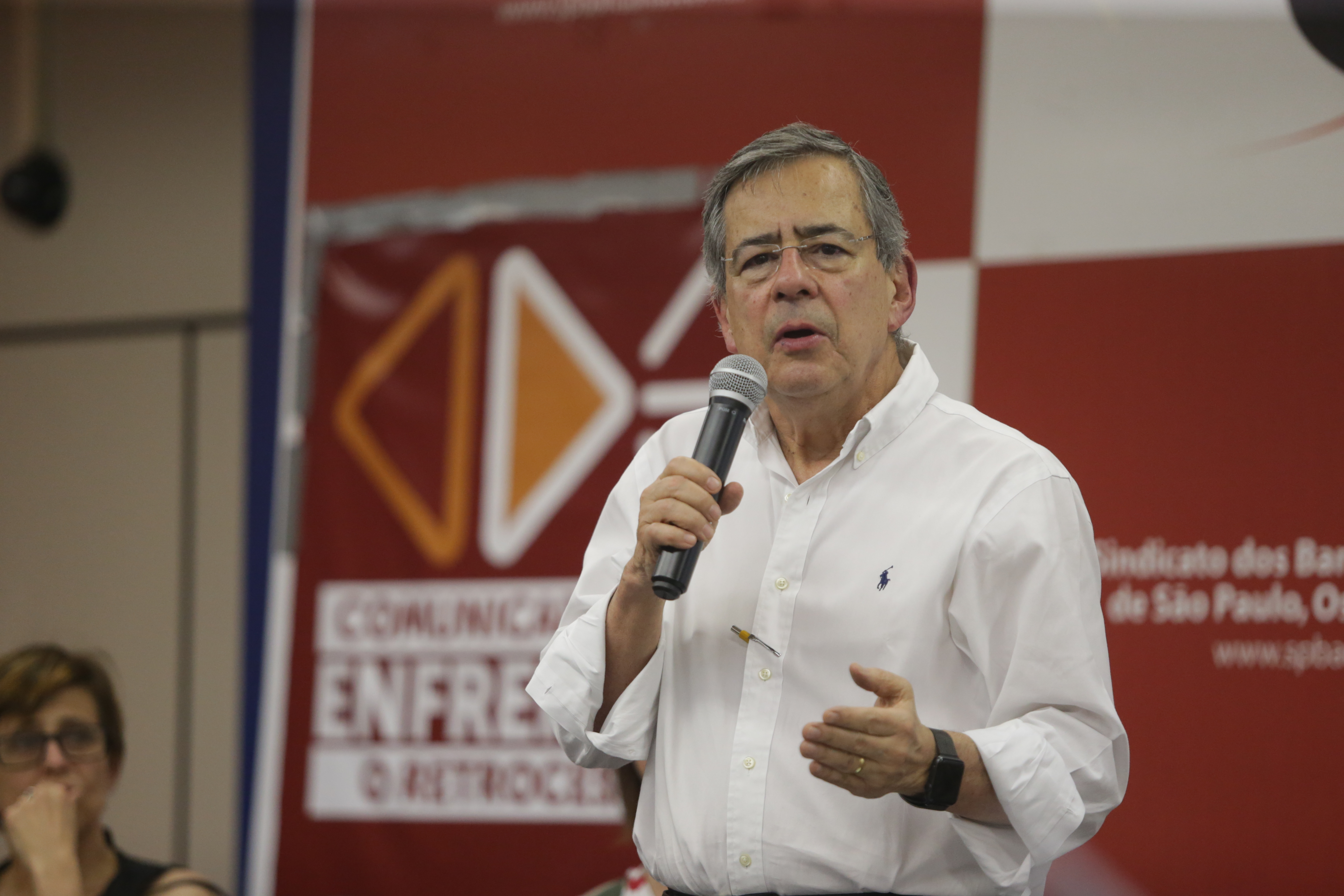 São Paulo 10/11/2017 Seminário "Comunicar para enfrentar o retrocesso" Sede do Sindicato dos Bancários de São Paulo, Osasco e região . Foto Paulo Pinto/AGPT